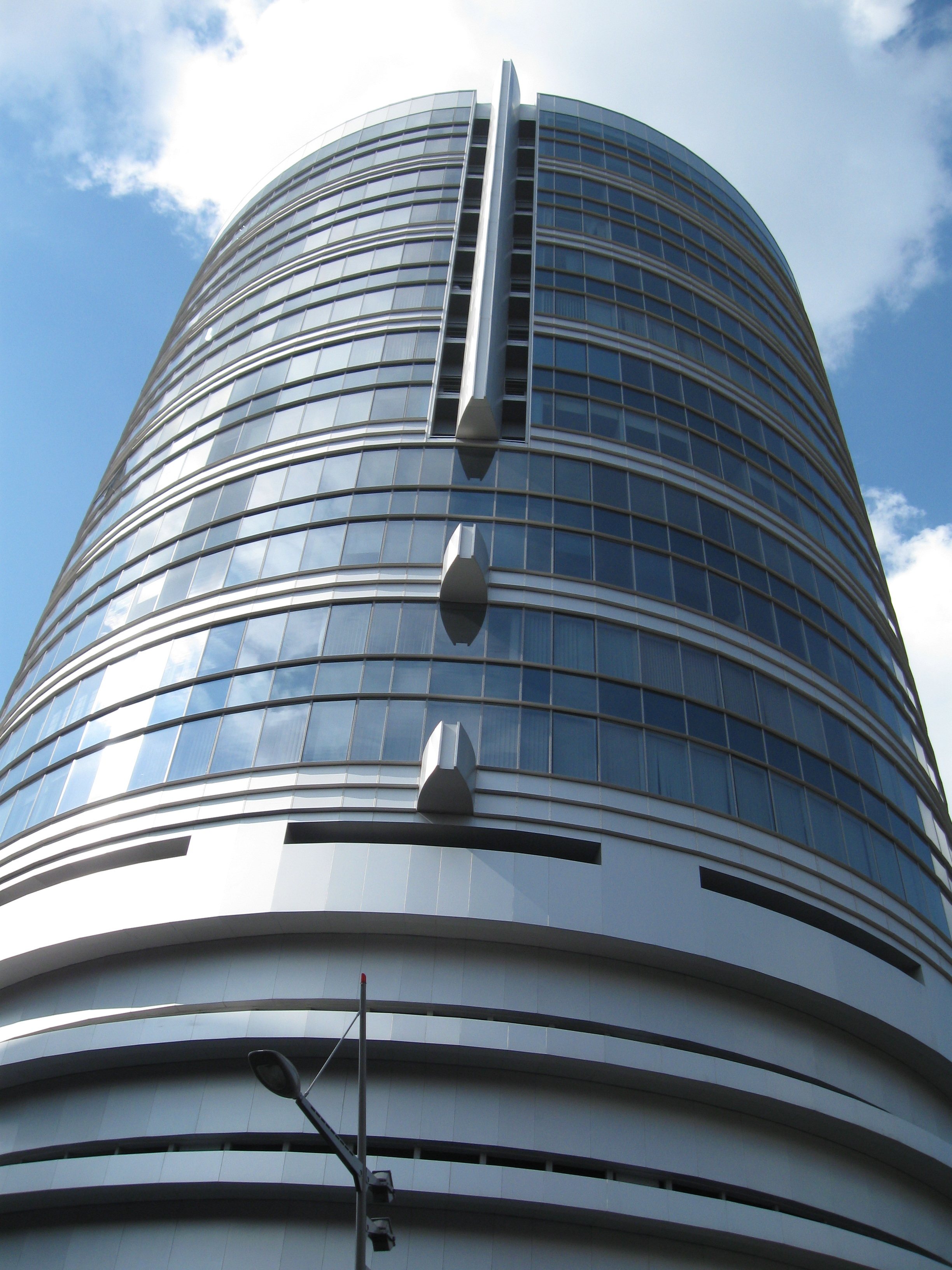 Одна из башен МОСТ СИТИ